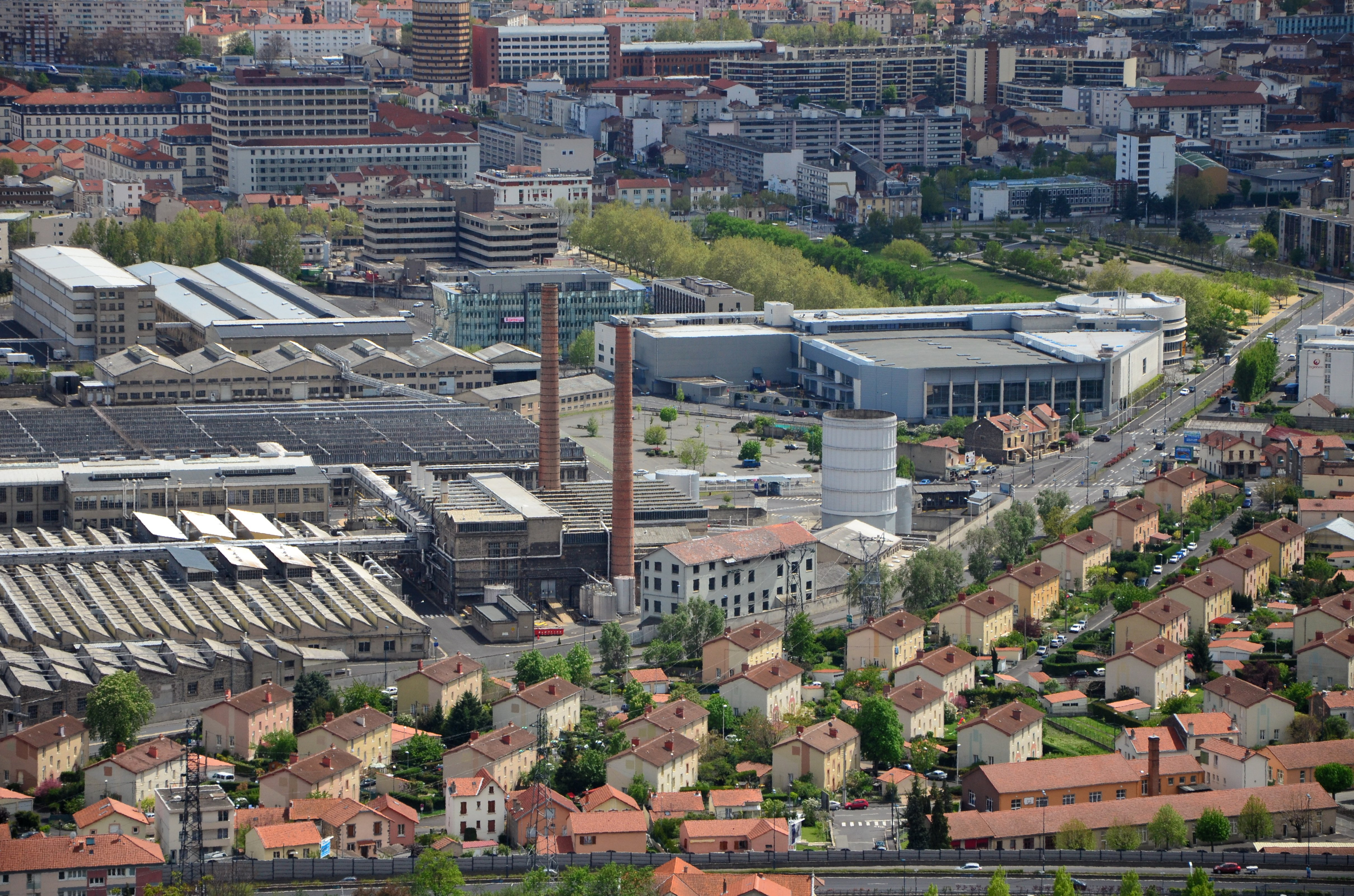 Vue de Clermont-Ferrand à partir des Côtes de Clermont (Chanturgue). Du premier au dernier plan : des Cités Michelin, l'usine Michelin de Cataroux, Poldôme, la Coopérative de Mai, la place du 1er Mai .